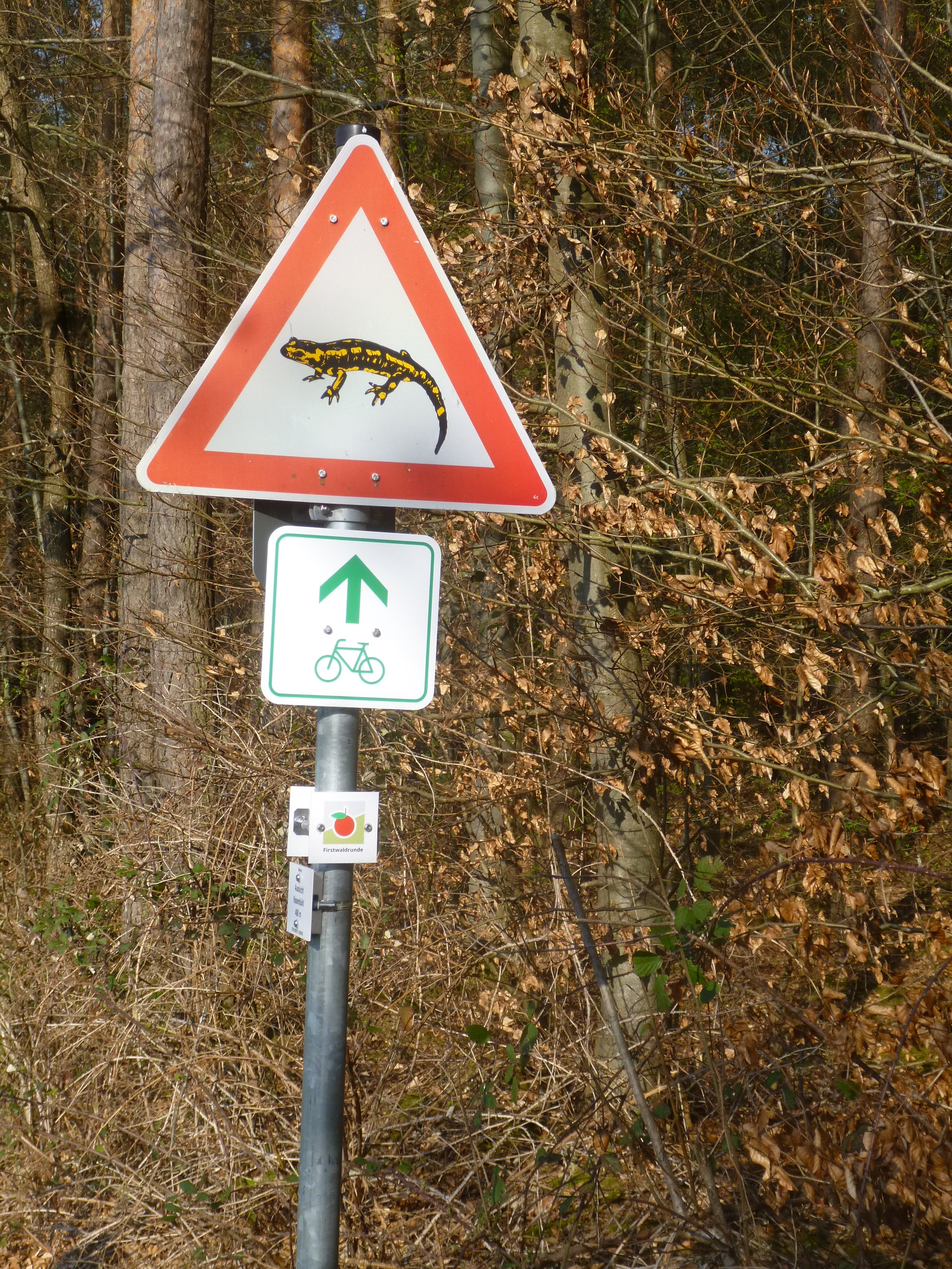 Nehren Hasenbühl Salamander 2020 Firstwaldrunde